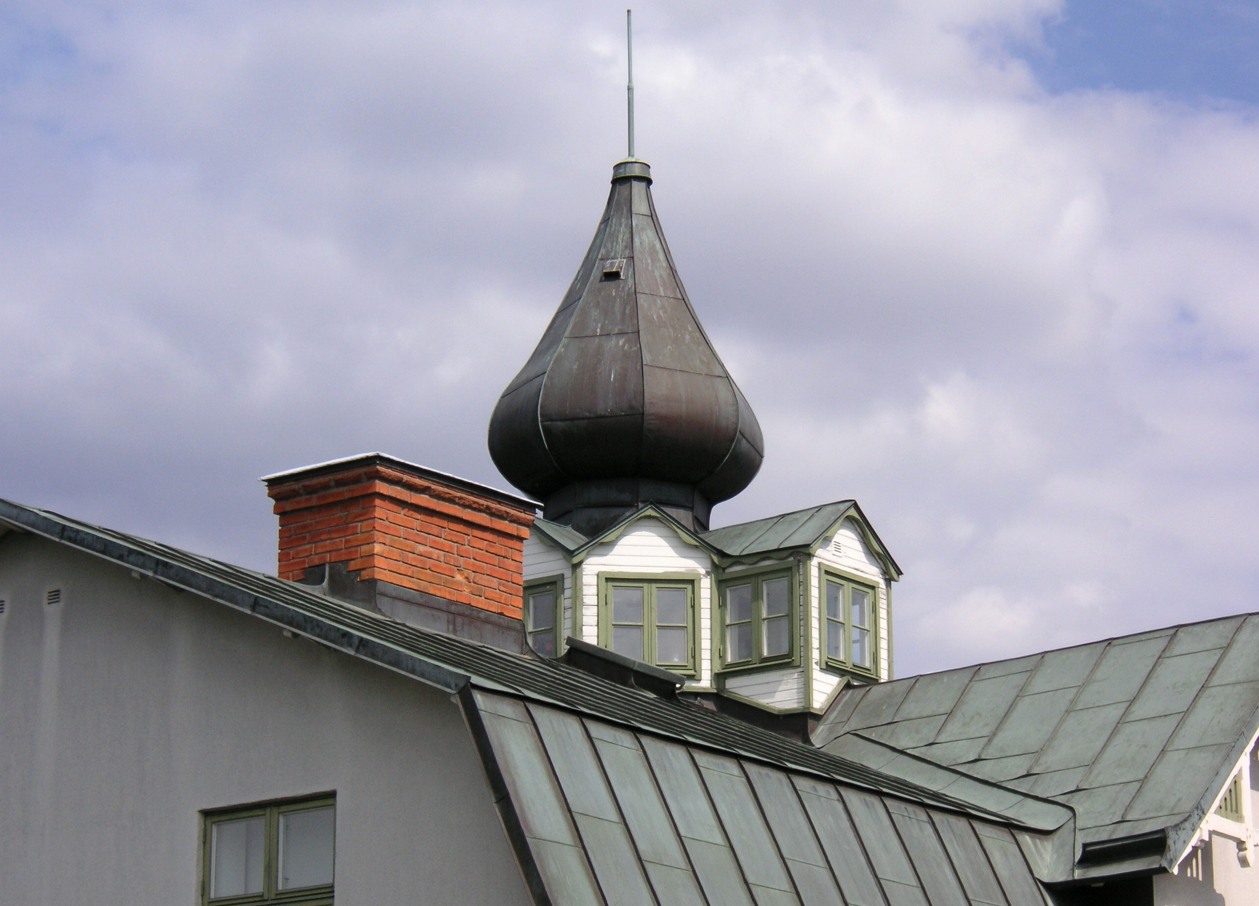 "Villa Utsikten" Utkiksbacken 30 i Gröndal